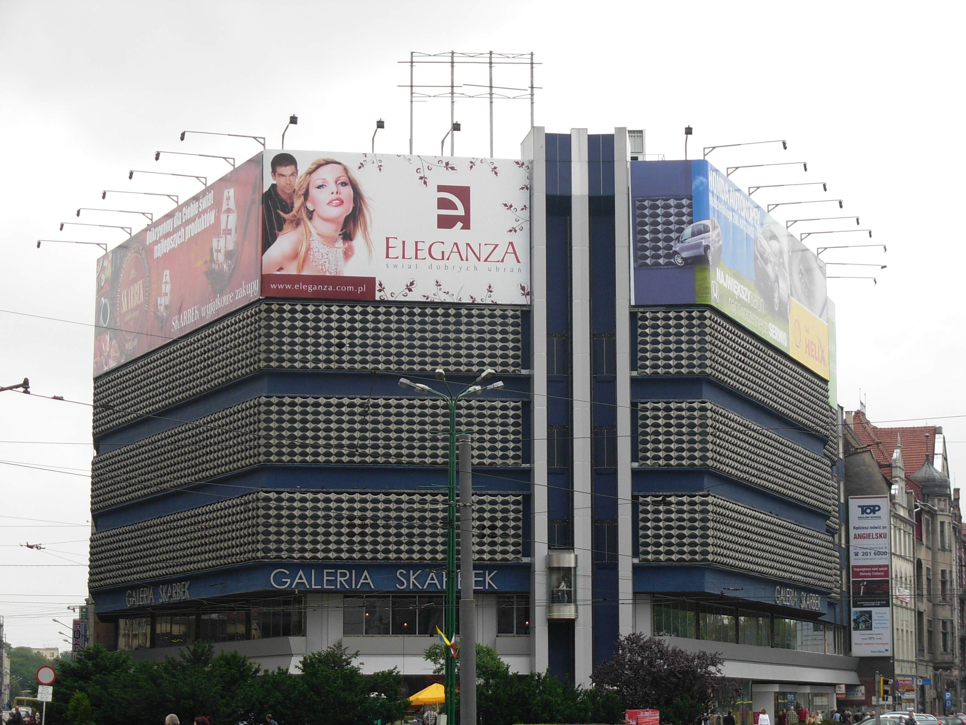 Katowice